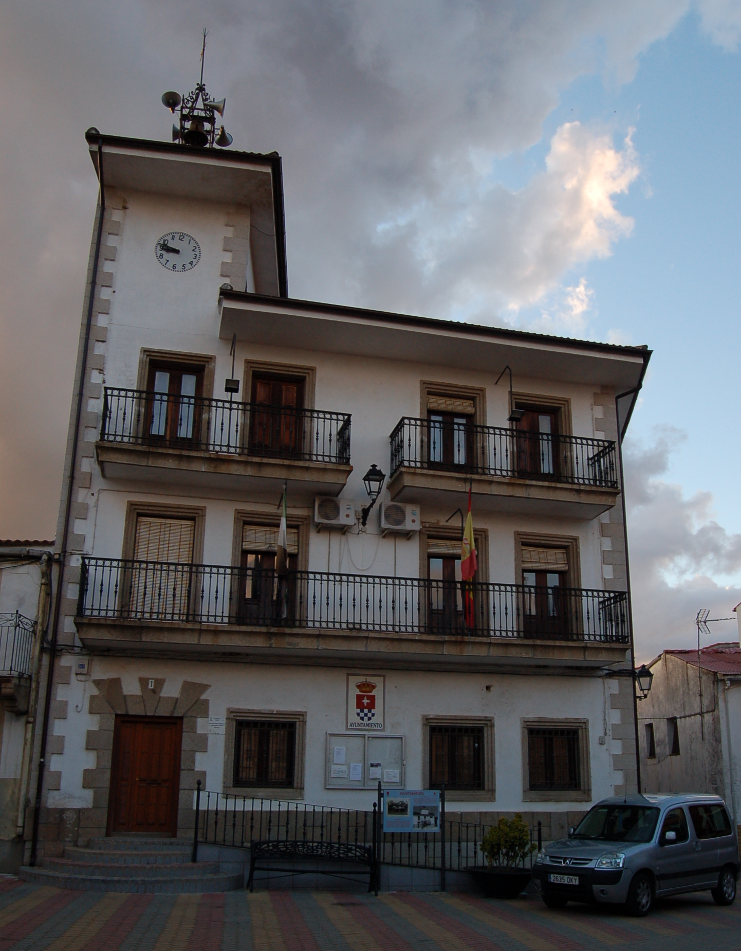 Casa consistorial de Palomero